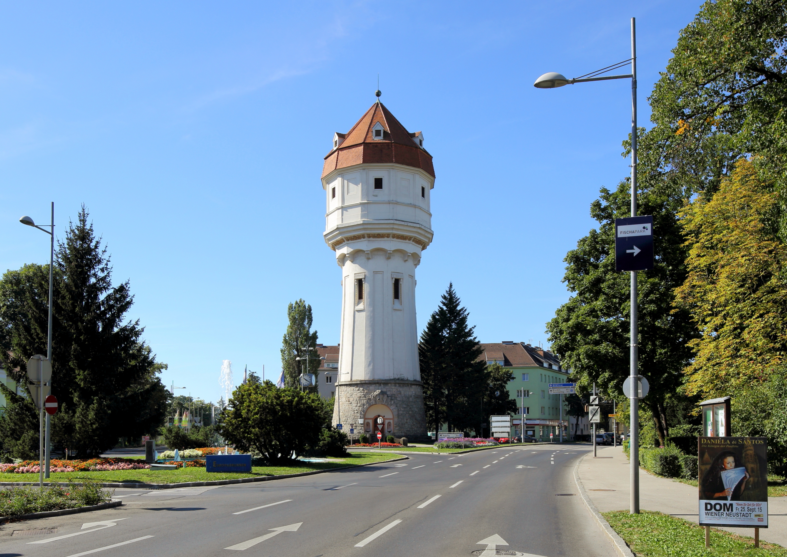 Nordostansicht des Wasserturmes der niederösterreichischen Stadt Wiener Neustadt. Der Wiener Neustädter Wasserturm wurde in den Jahre 1909/10 nach Plänen der Architekten Hans Jaksch und Siegfried Theiss vom Baumeister Anton Koblischek errichtet.